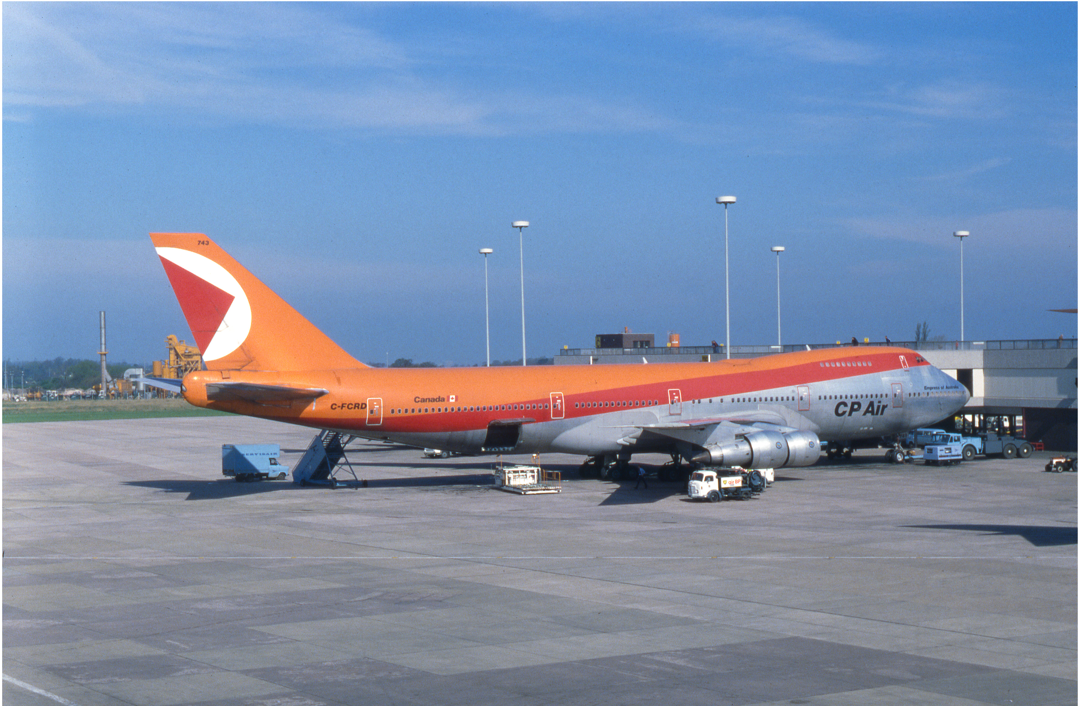 Manchester 1980